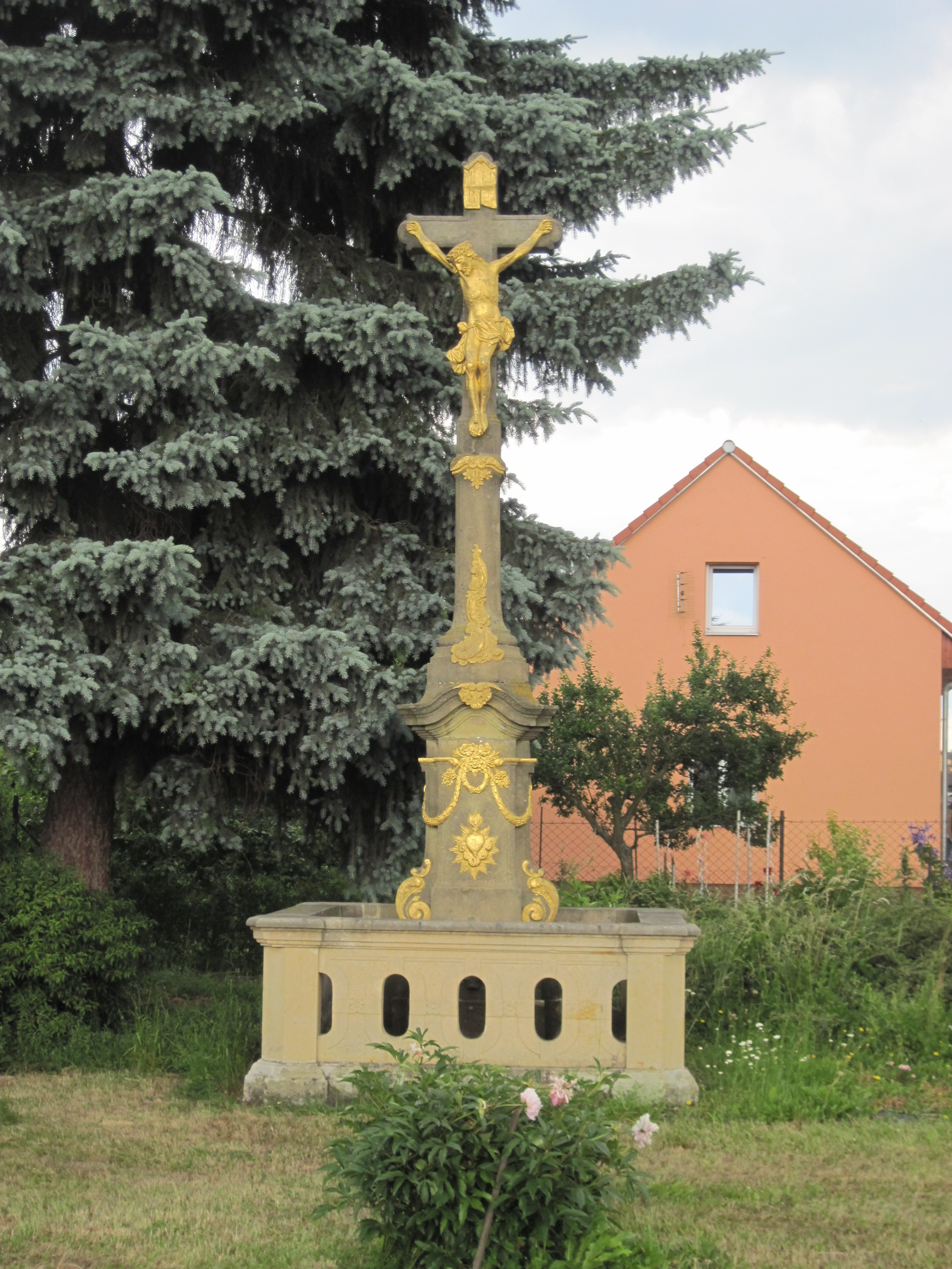 na křižovatce Staroholická a 1. máje